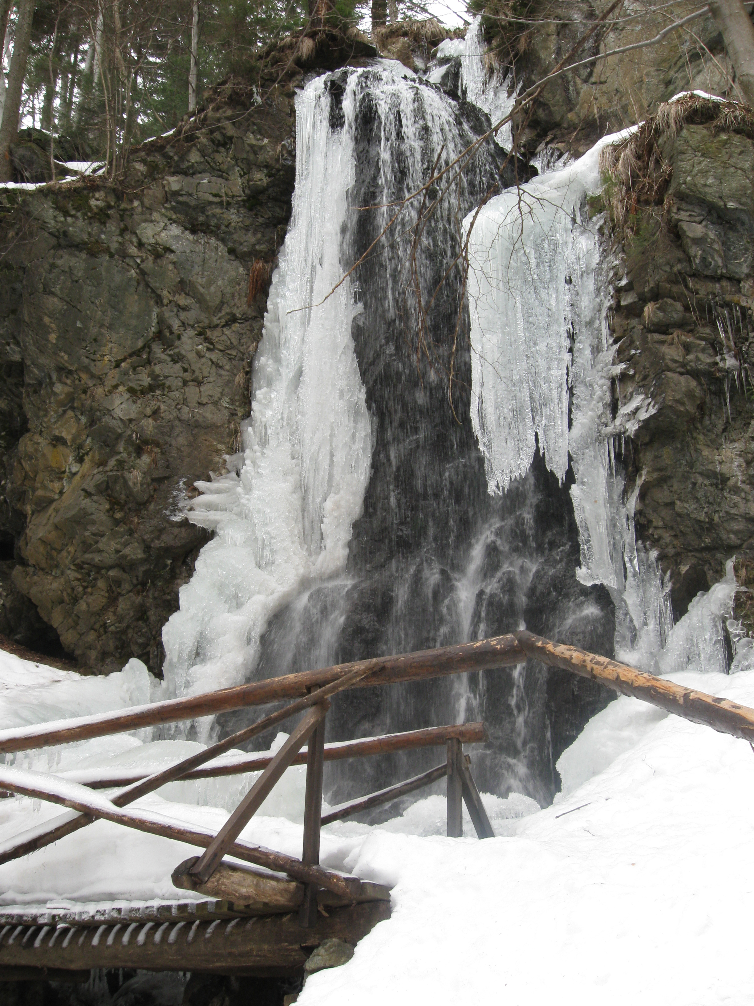 Slap Skalce - Pohorje